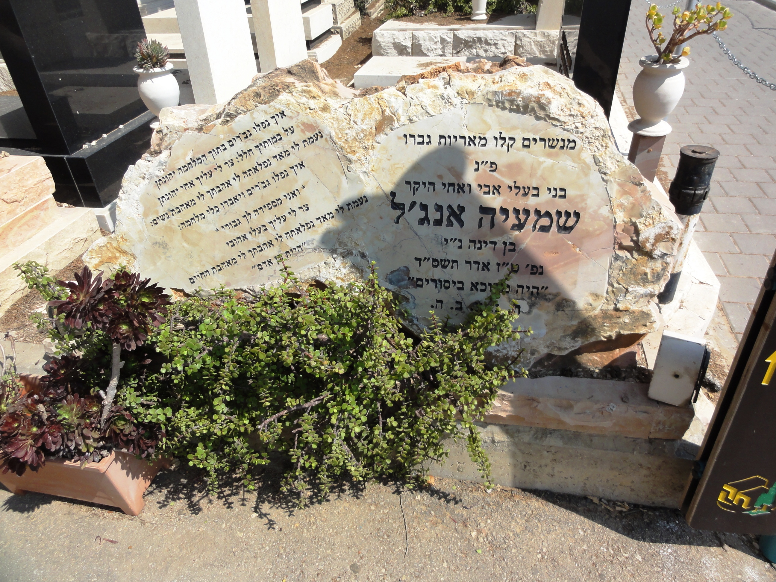 קברו של שמעיה אנג'ל